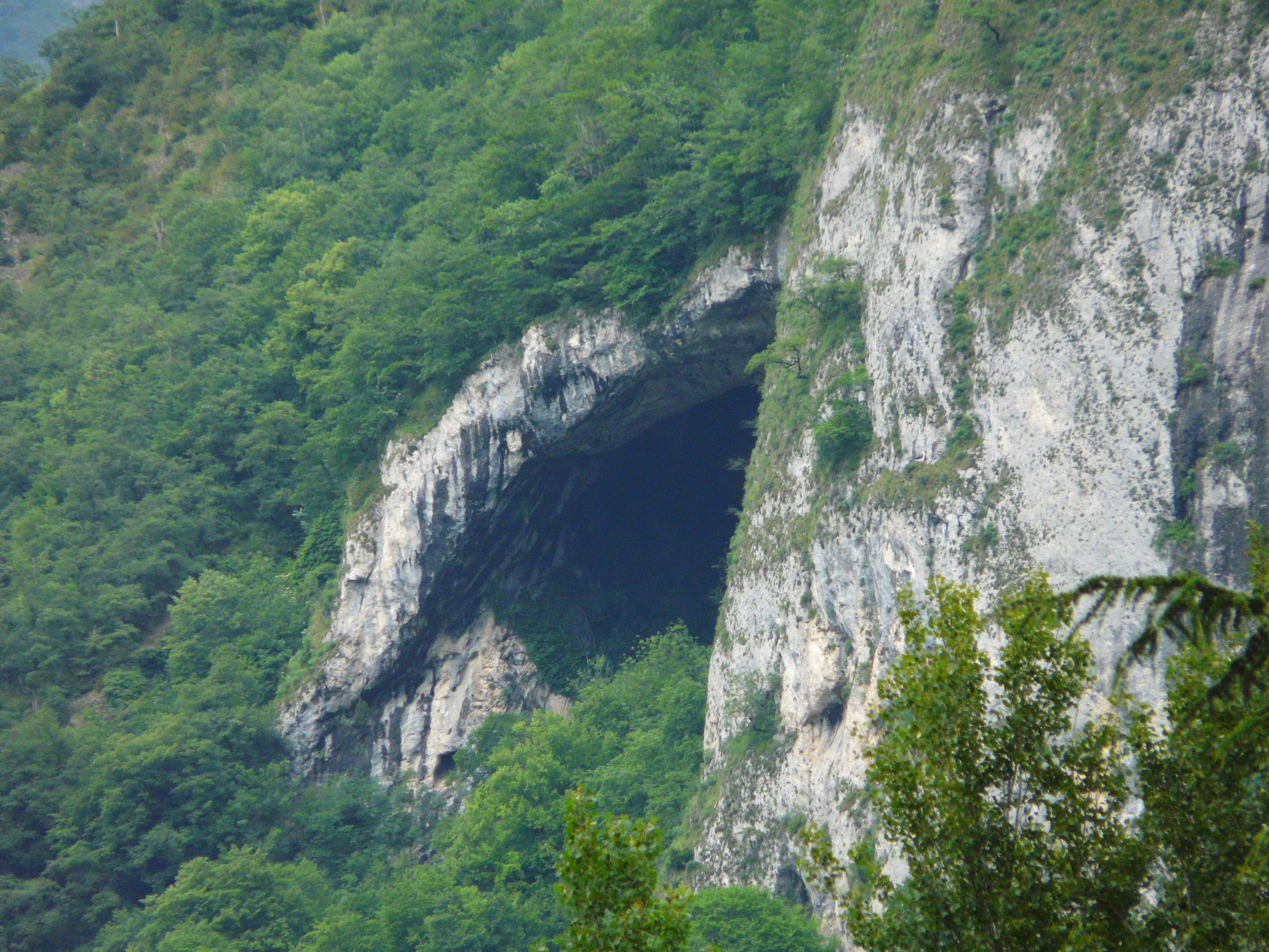 La grotte du Mail du Faucon, Eup, Haute-Garonne, France.